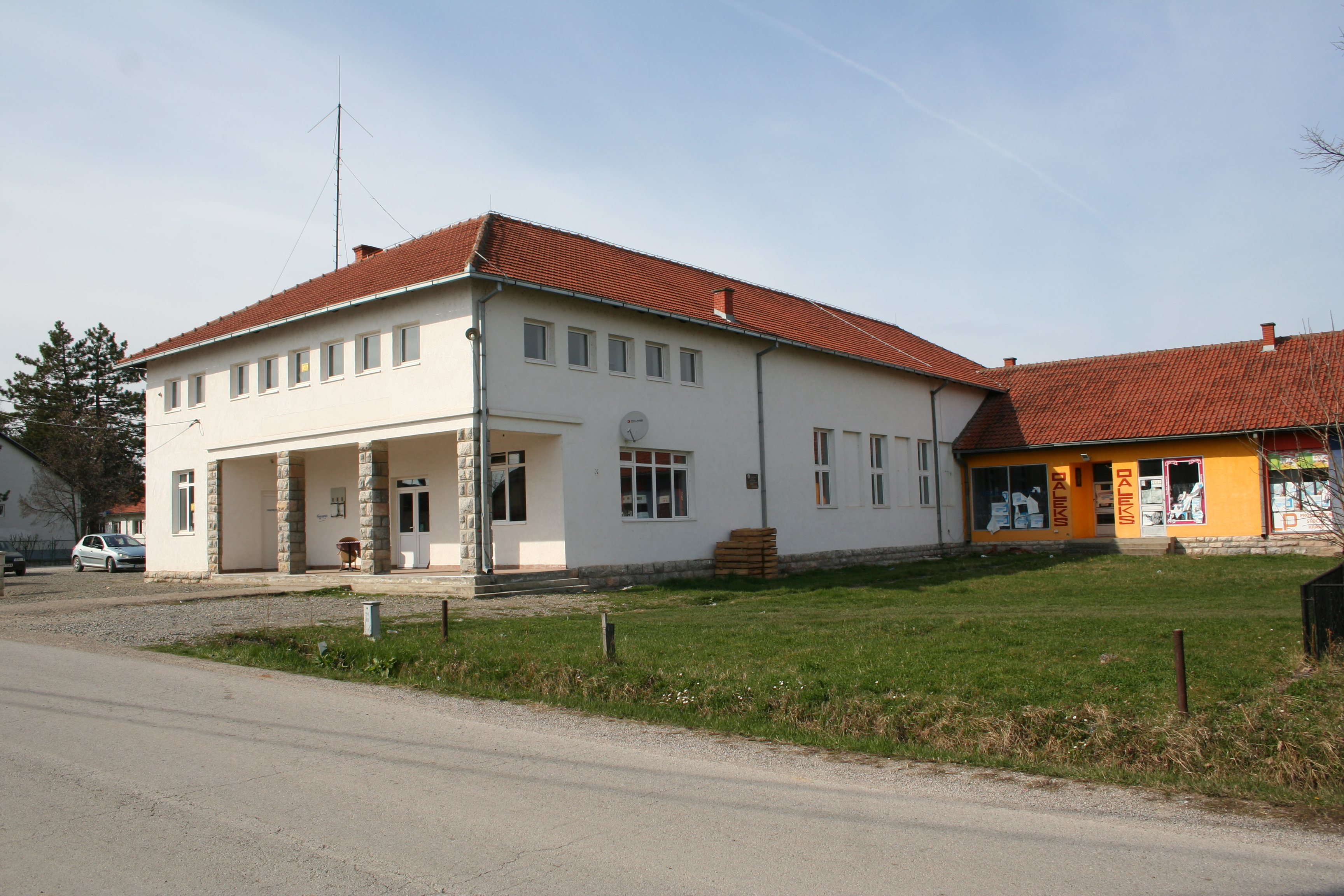 Centar sela